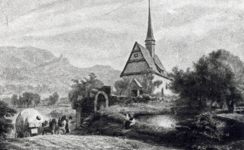 Die Dorfkirche Göschwitz in einem Aquarell von Carl Hummel aus dem Jahr 1860.